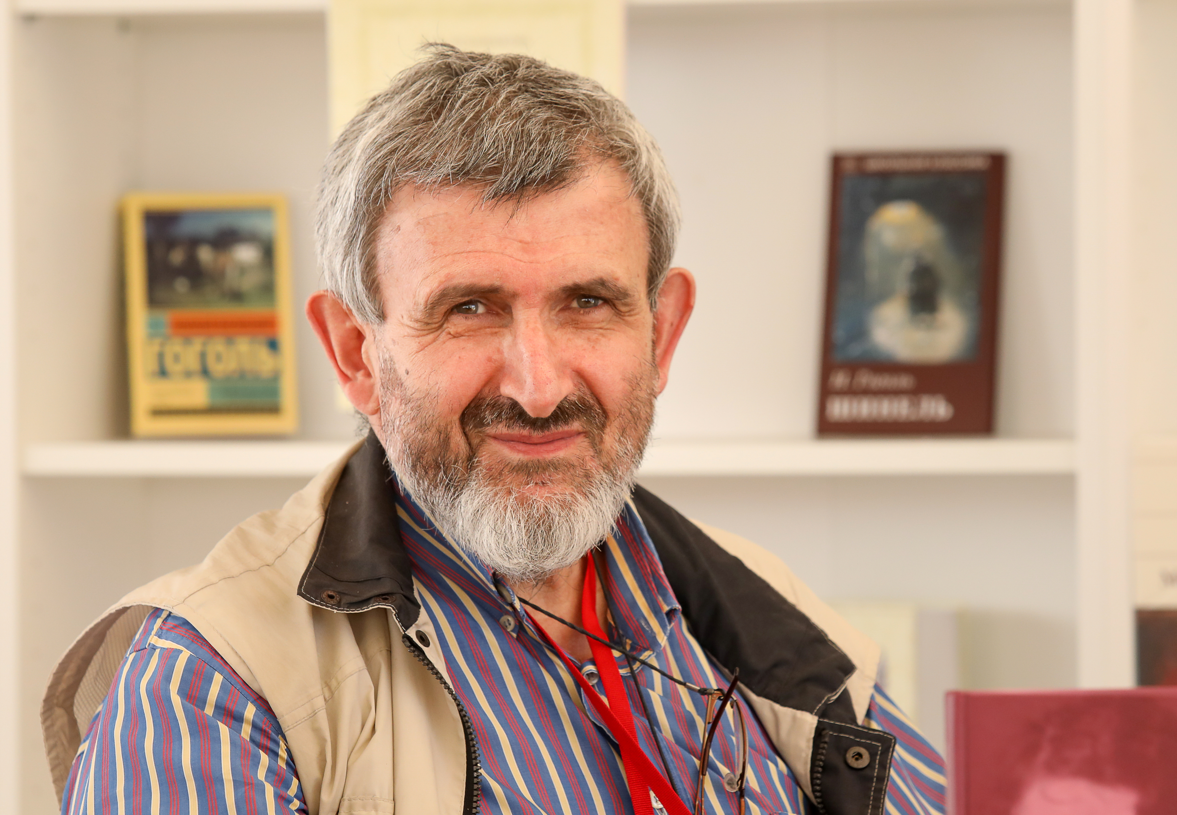 Писатель Павел Нерлер на книжном фестивале «Красная площадь».